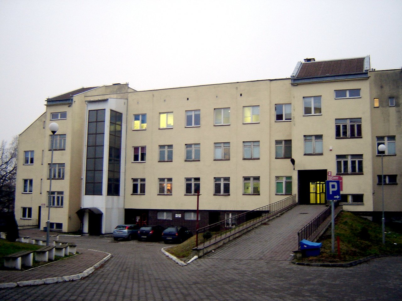 Choszczno, szpital internistyczny (jeden z wielu budynków kompleksu szpitalnego).